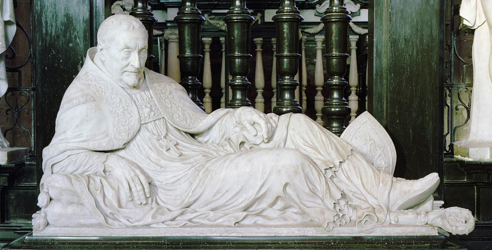 Praalgraf van Antonius Triest, 1652-1654; inv nr: 237